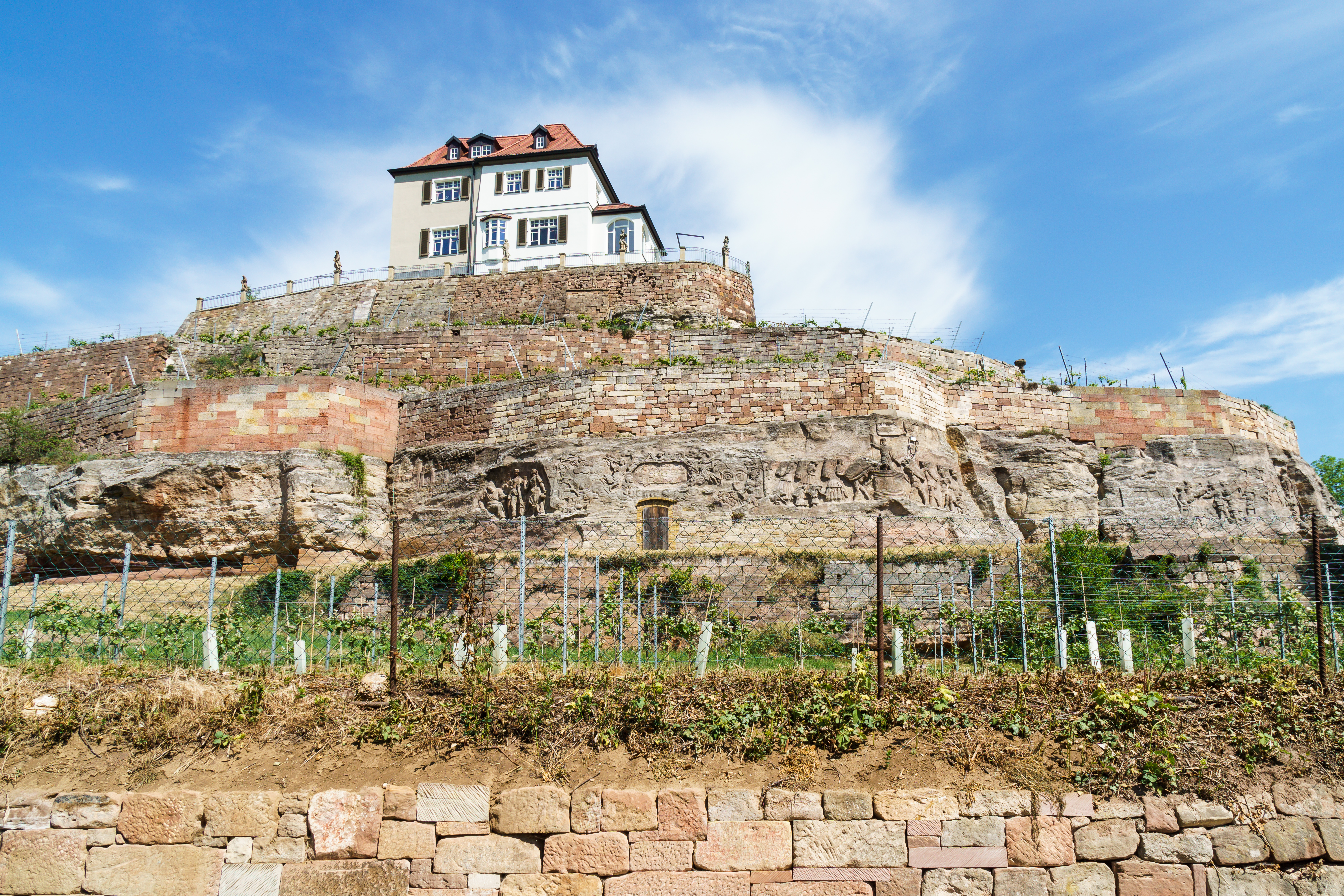 Steinernes Festbuch, darüber das Weingut Steinauer Berg Blütengrund 11 in Naumburg OT Großjena